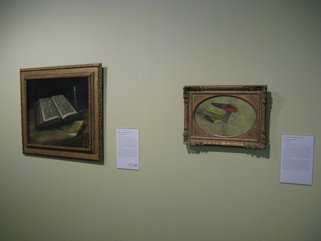 fotosessie 23-6-2009 Van Gogh Museum